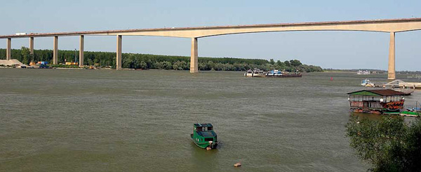 Szerbia, Beška viadukt. Autópálya híd, a Duna leghosszabb hídja. Gyukics Péter felvétele.* [1] , * [2] , * [3]